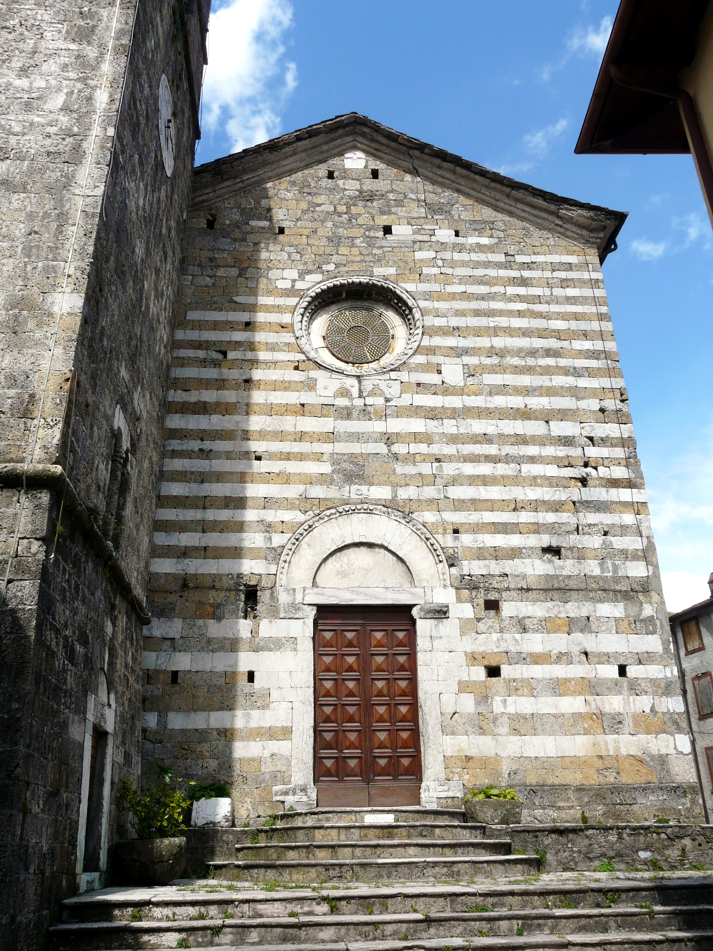 Chiesa di San Regolo, Vagli Sotto, Toscana, Italia